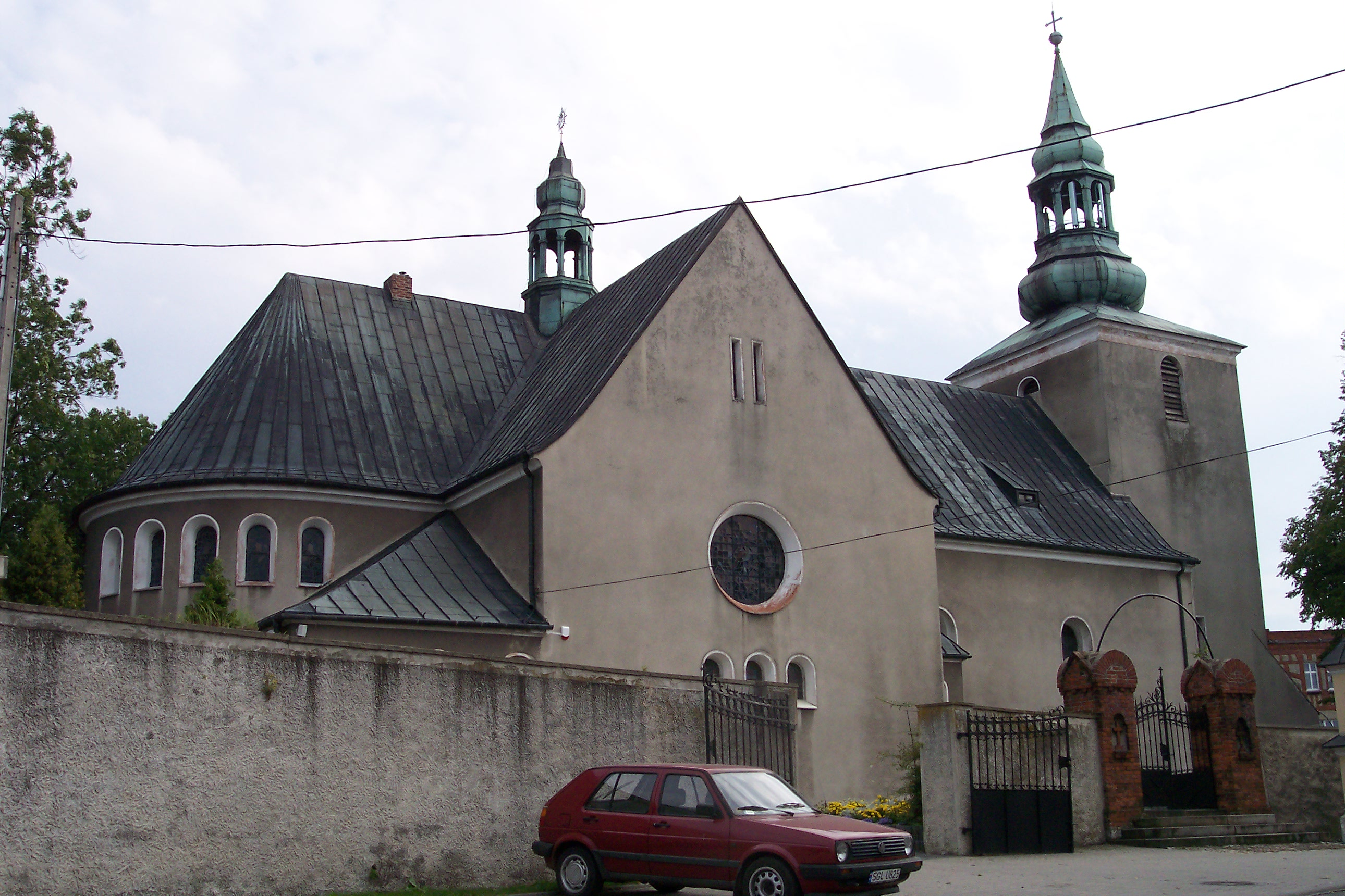 Późnogotycki kościół parafialny Wniebowzięcia Najświętszej Maryi Panny z XV w. w Wielowsi (województwo śląskie)